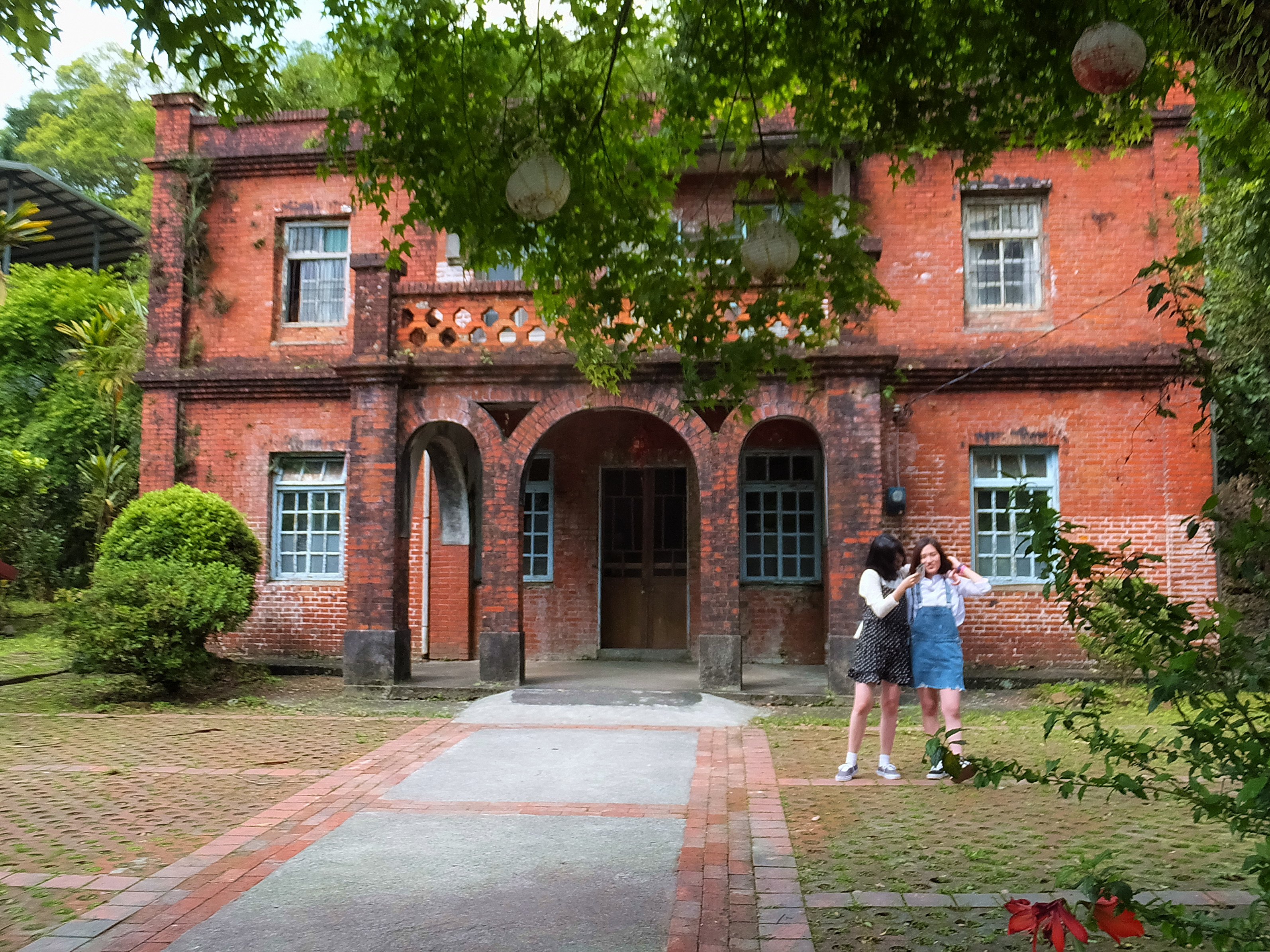 嶺腳蔡家洋樓 Lingjiao Cai Mansion